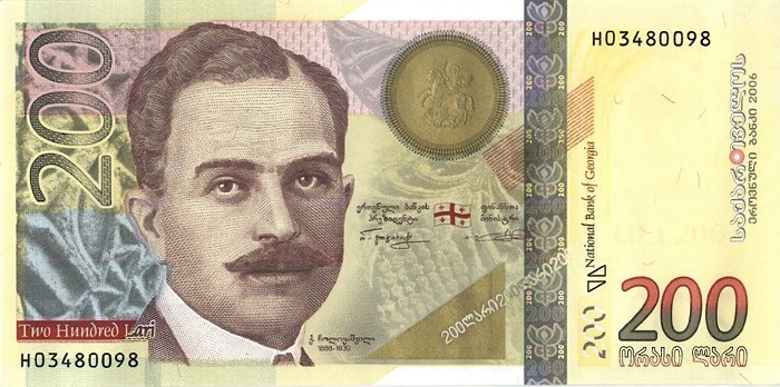 200 lari Georgian 200 lari with the portrait of Kakutsa Cholokashvili